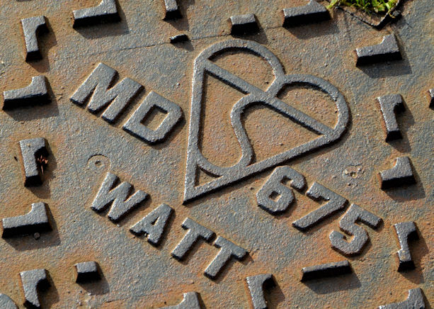 Placa de metal con el símbolo de normalización Kitemark formado por una B, S y una V (British Standards Verification)